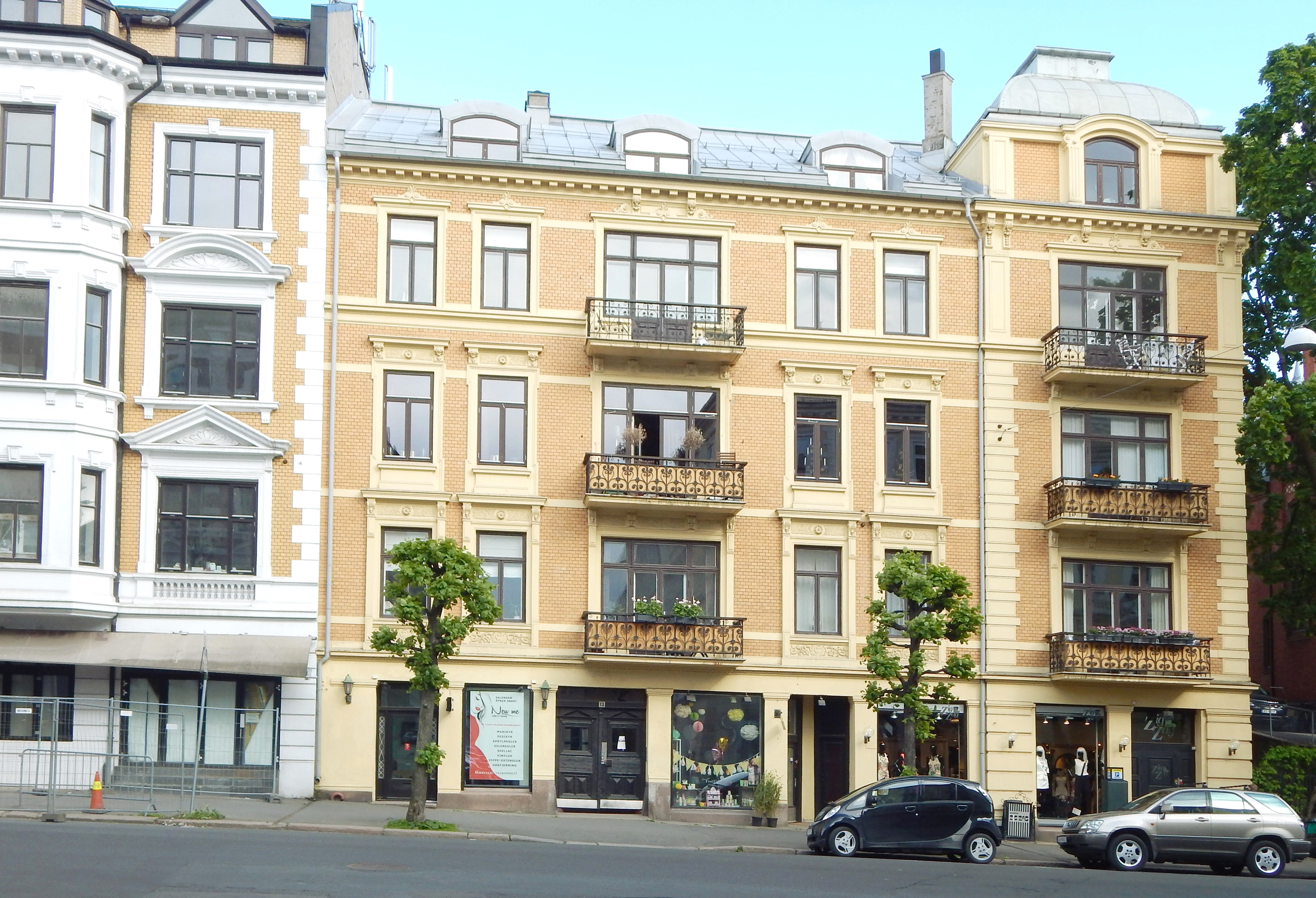 Skovveien 13 (arkitekt:Olaf Boye)